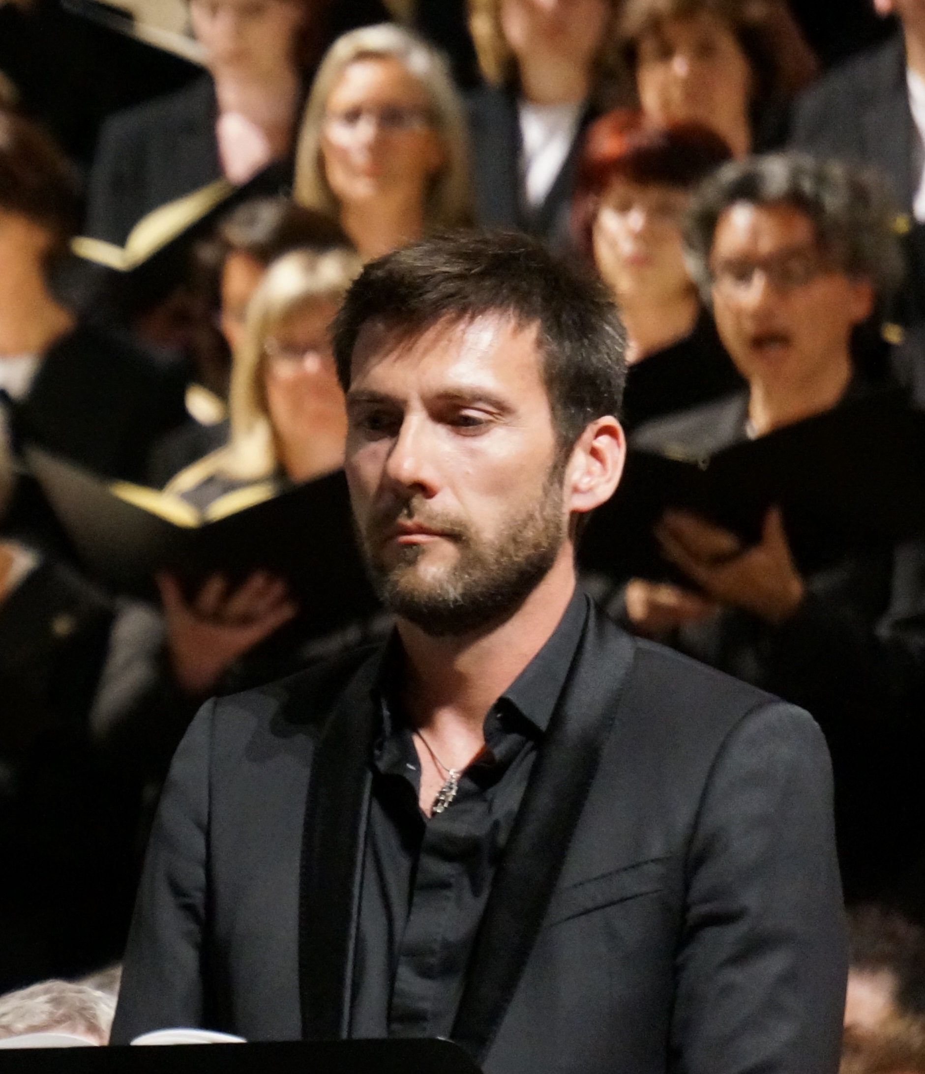 Nicolas Courjal.